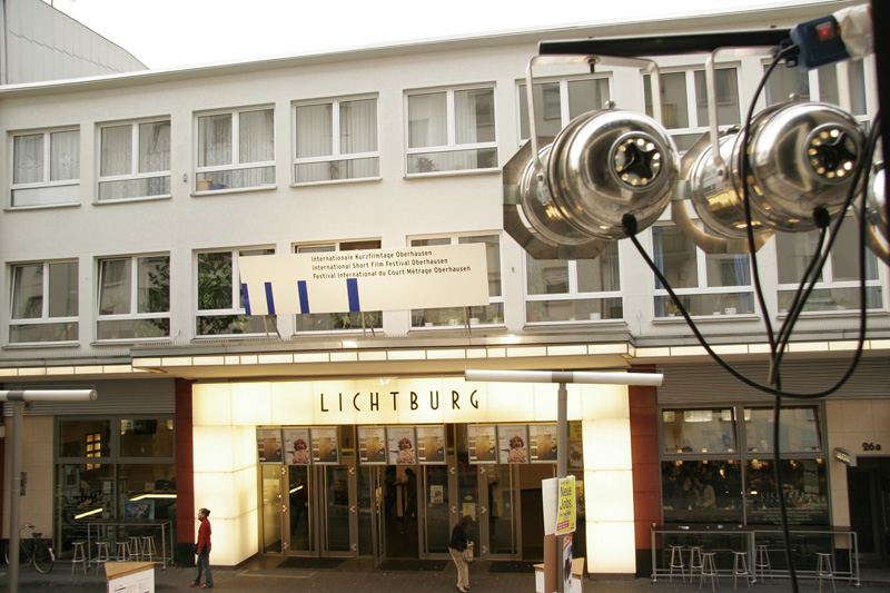 Vor dem Festivalkino Lichtburg Filmpalast, Oberhausen